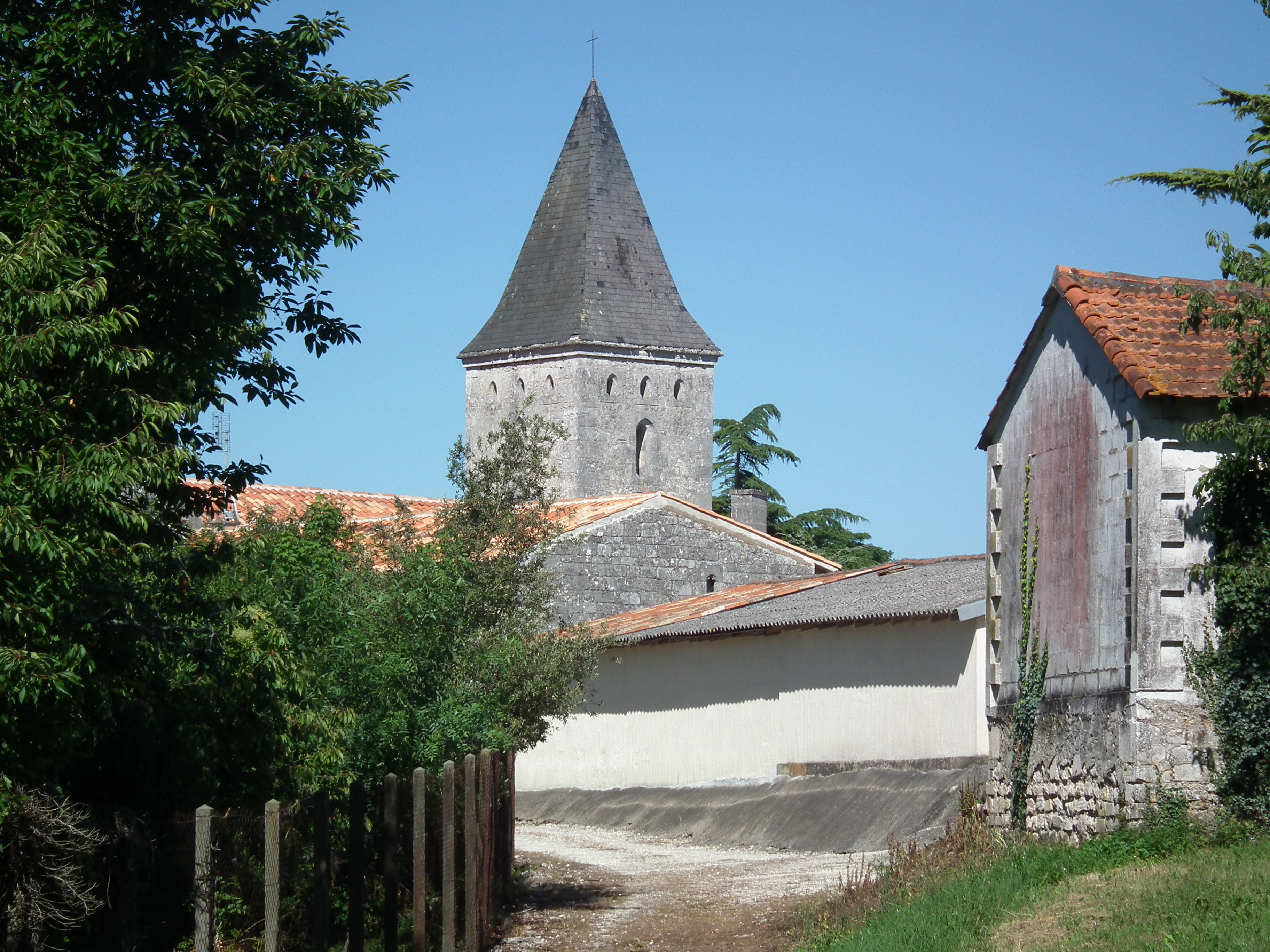 Saint-Georges-Antignac